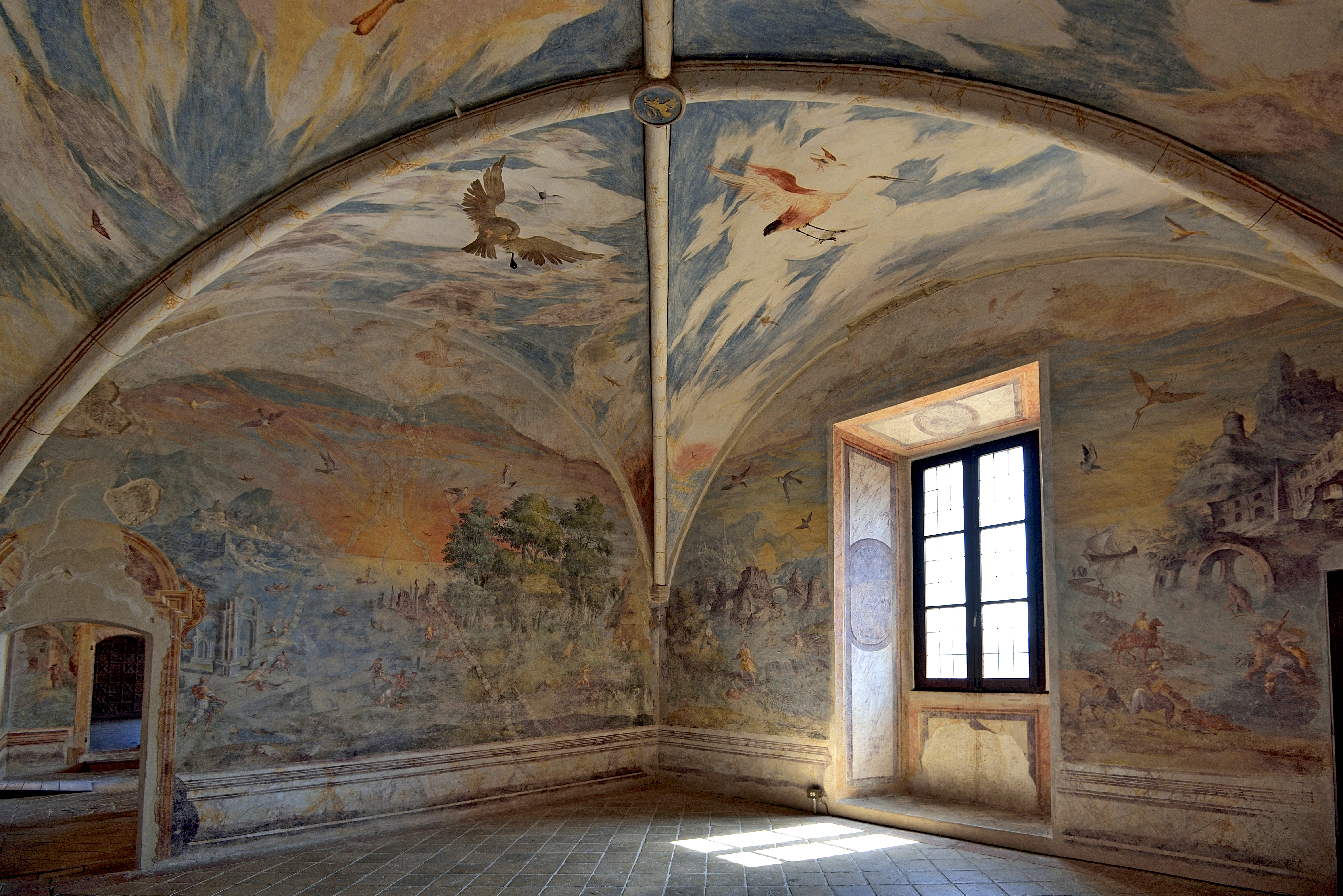 castello di Torrechiara . Sala del Meriggio, l'ambiente è coperto da una volta a crociera con costoloni, che convergono in chiave di volta in un medaglione decorato con un leone, stemma dei Rossi This is a photo of a monument which is part of cultural heritage of Italy.